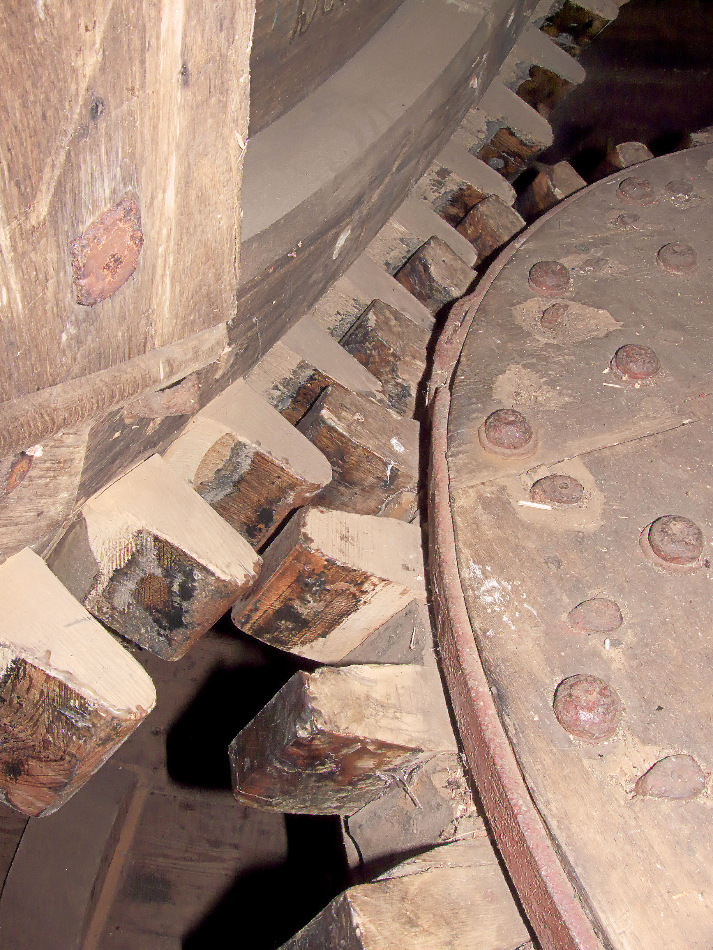 Walderveense molen, stand kammen bovenwiel en conische bonkelaar